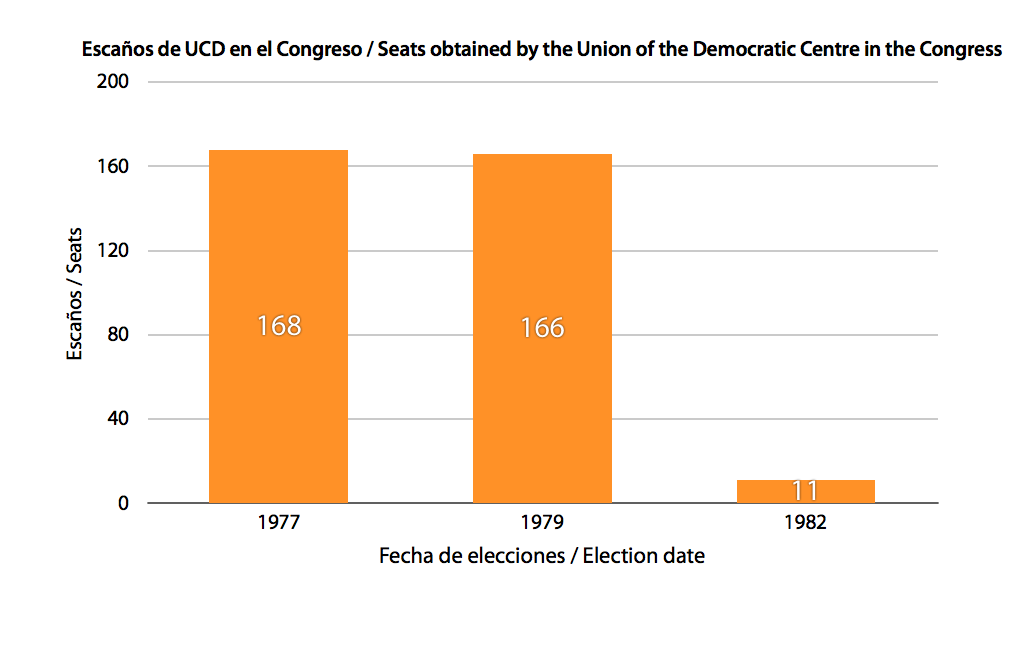 Evolución de escaños de UCD